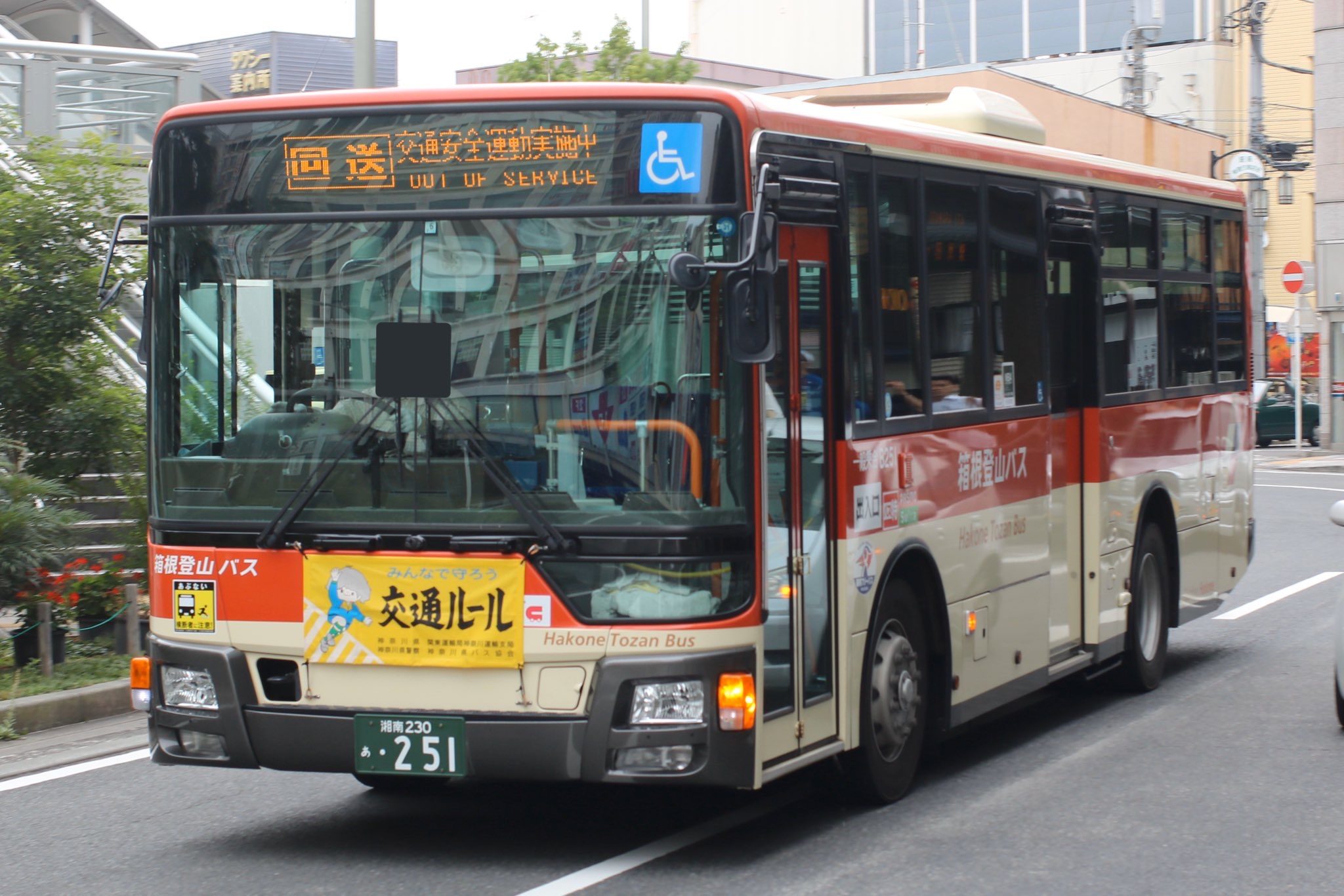 箱根登山バス 回送 湘南230 あ 251